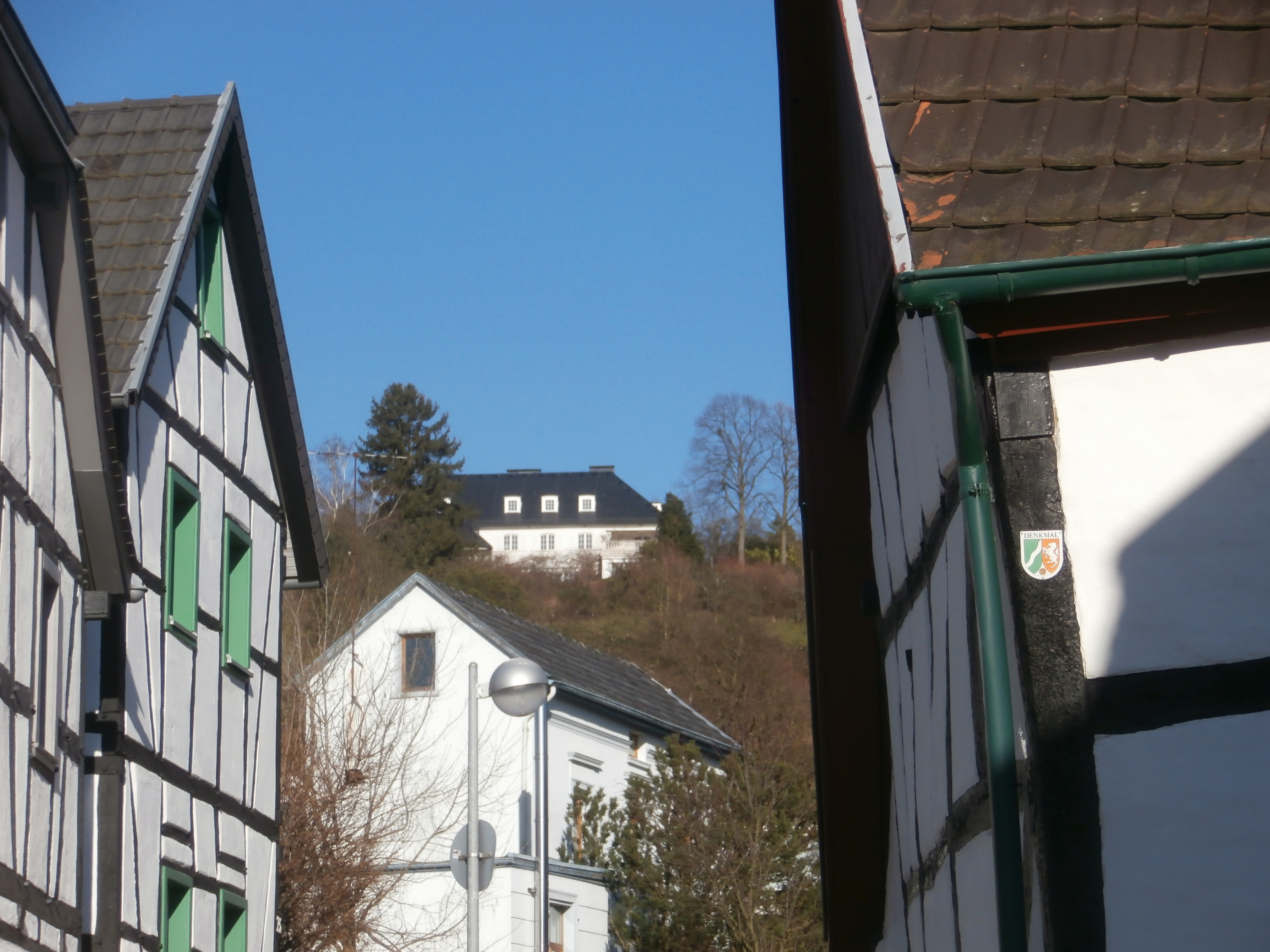 Bismarckstraße mit Blick zur oberhalb von Bondorf gelegenen Villa Heckenfels (Bondorfer Straße 34), Bad Honnef; rechts das denkmalgeschützte Fachwerkhaus Bismarckstraße 34